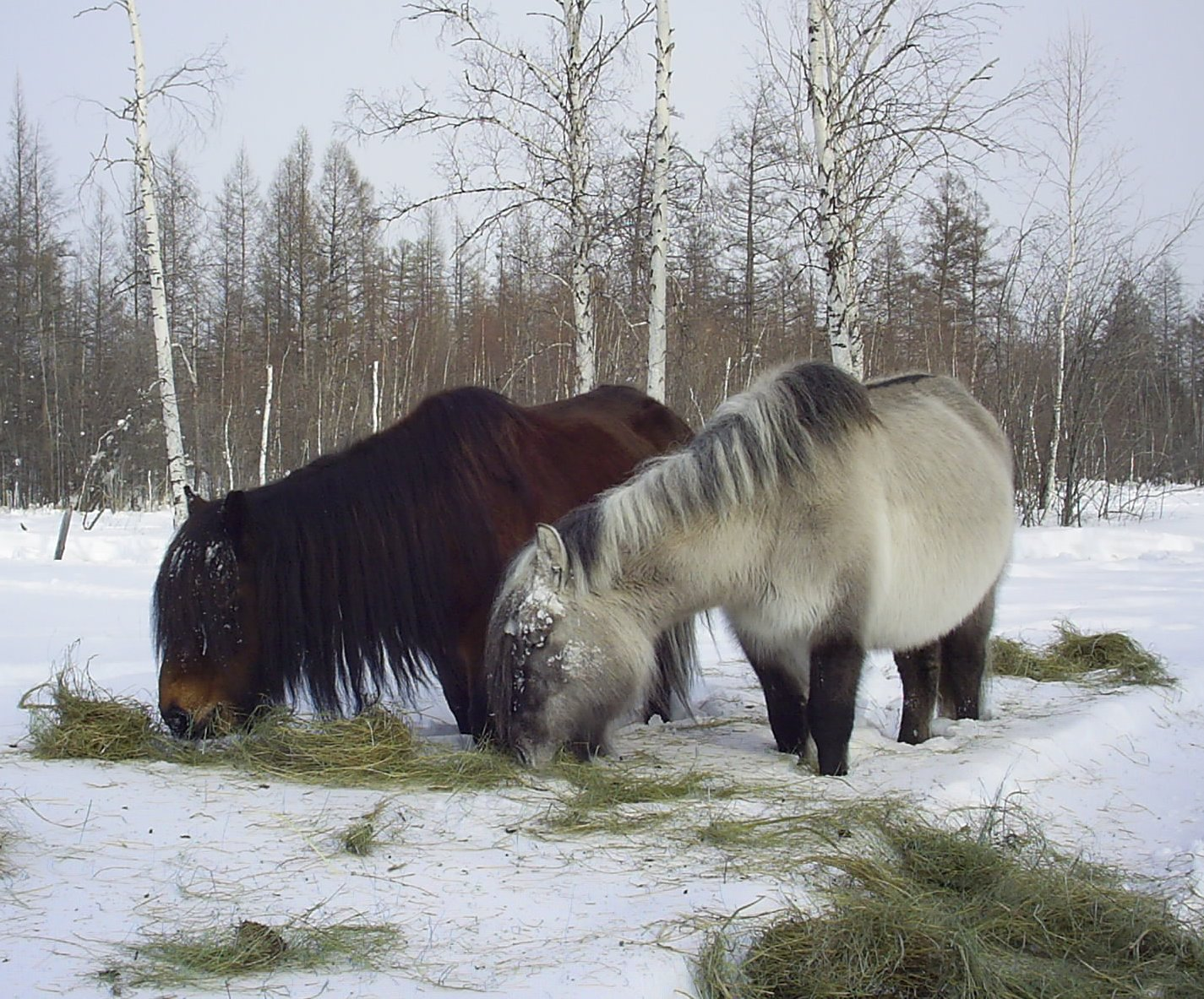 Автор: Светлана Иванова. Вилюйский район. В 4 км к западу от Вилюйска